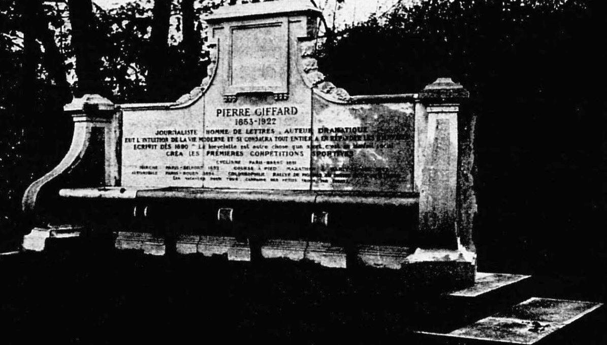 Le Monde Illustré du 24 novembre 1923, p.394.